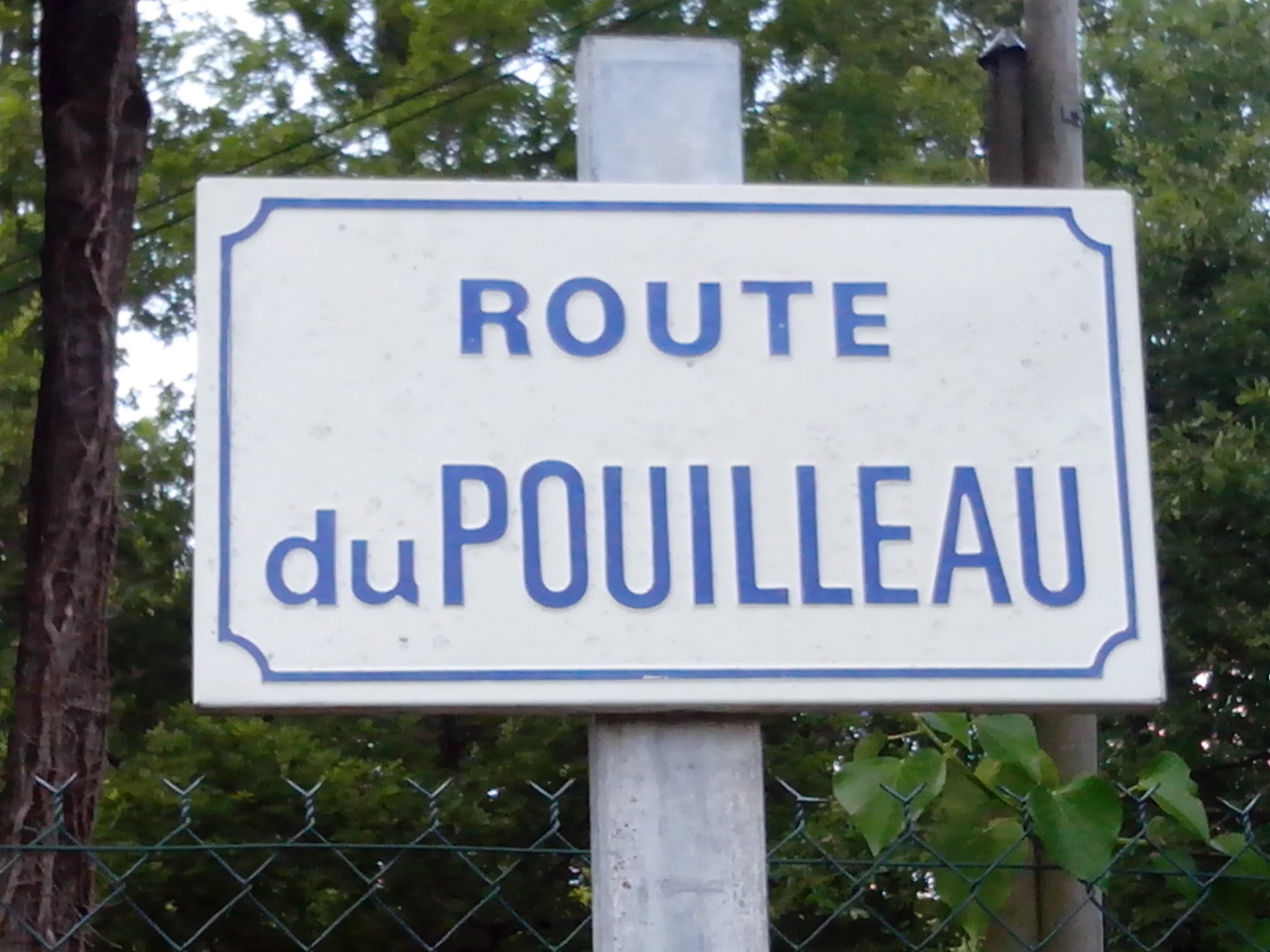 La route du Pouilleau à Breuillet